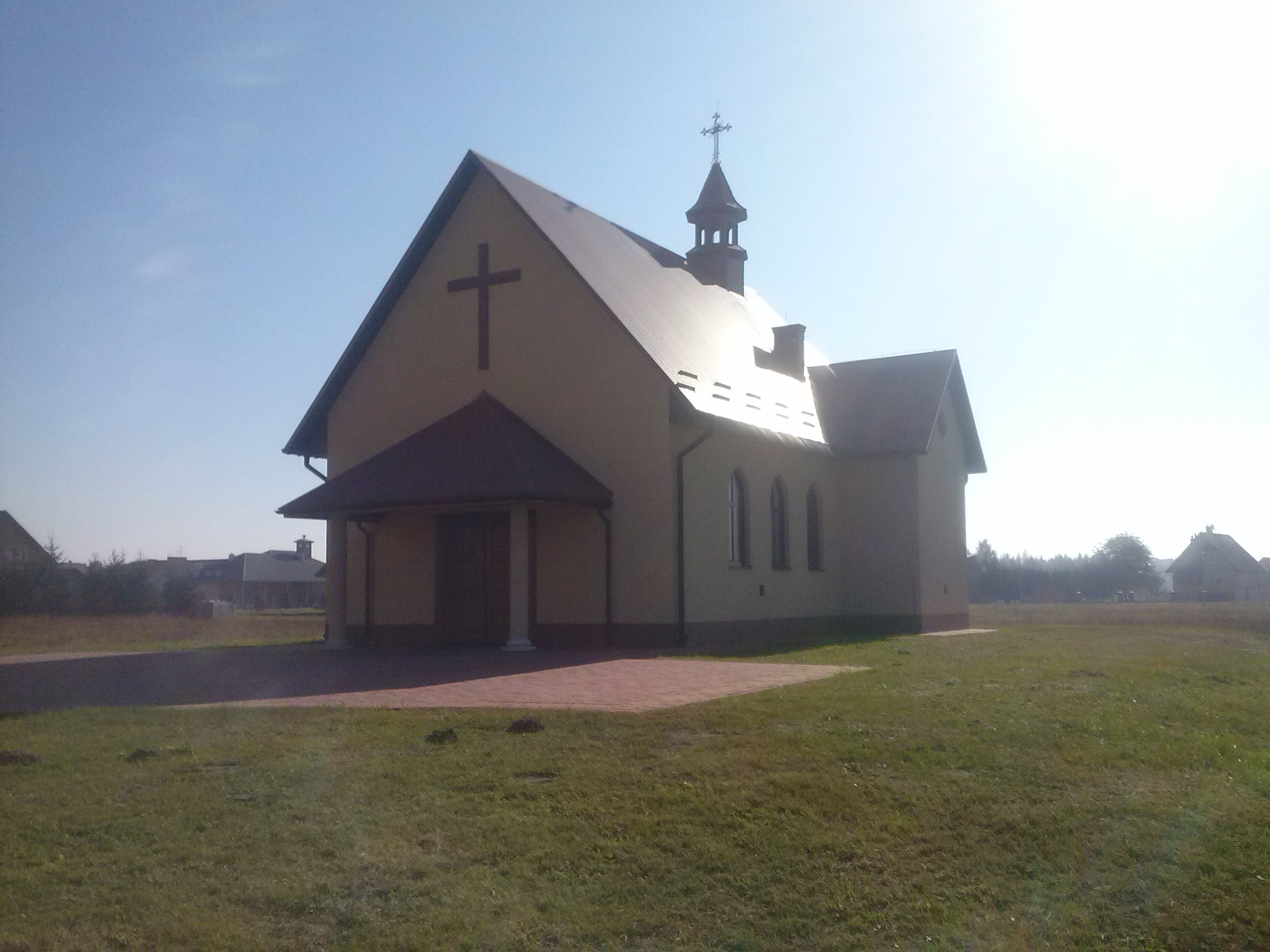 Kaplica pogrzebowa parafialna w Tryńczy